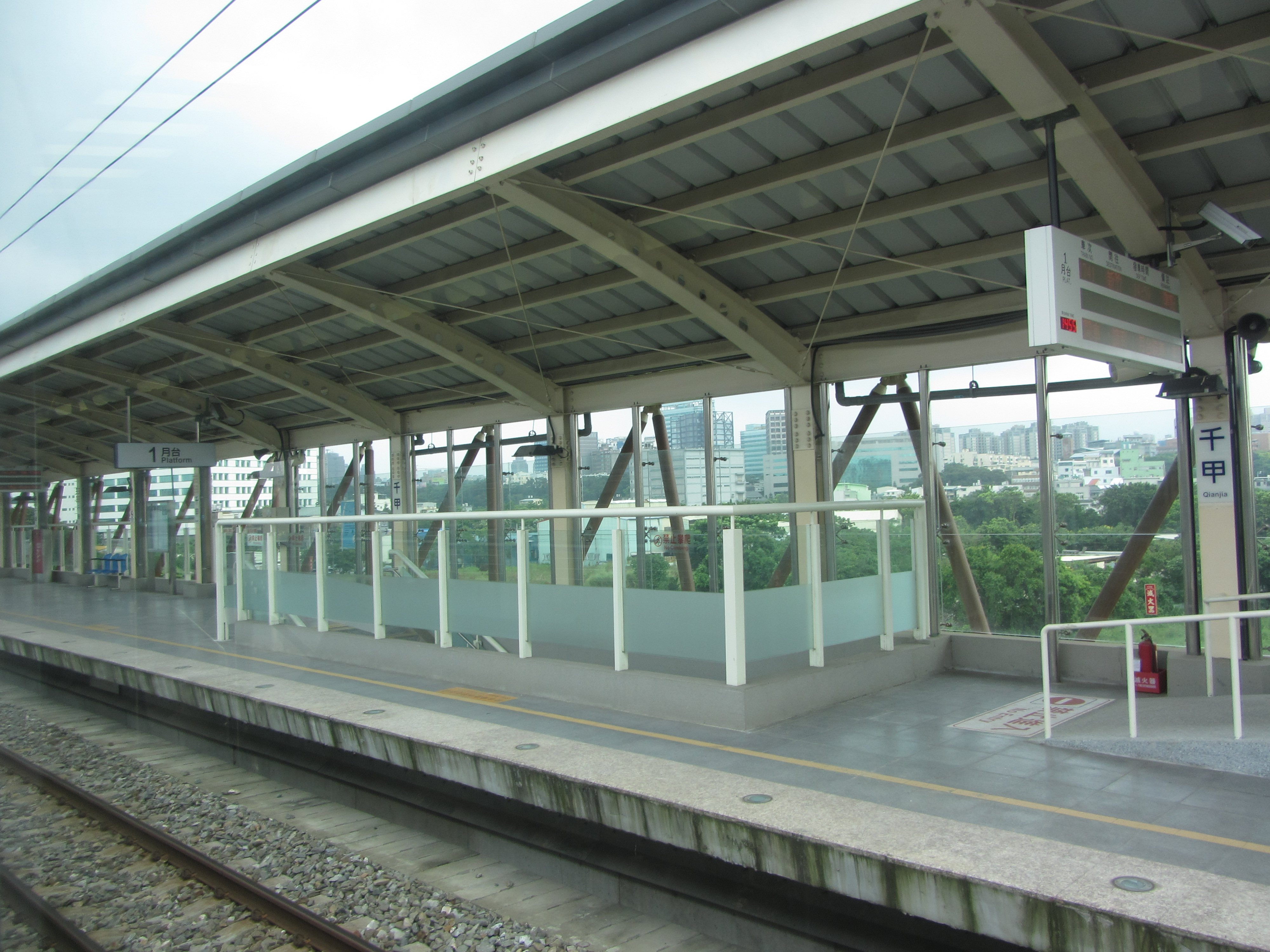 中文（台灣）: 台鐵千甲車站月台。